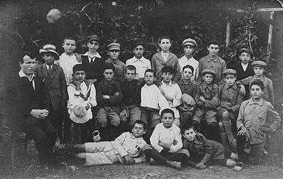 ירוחם ורדימון עם כיתתו בבי-ס לבנים, ד' תשרי התרף